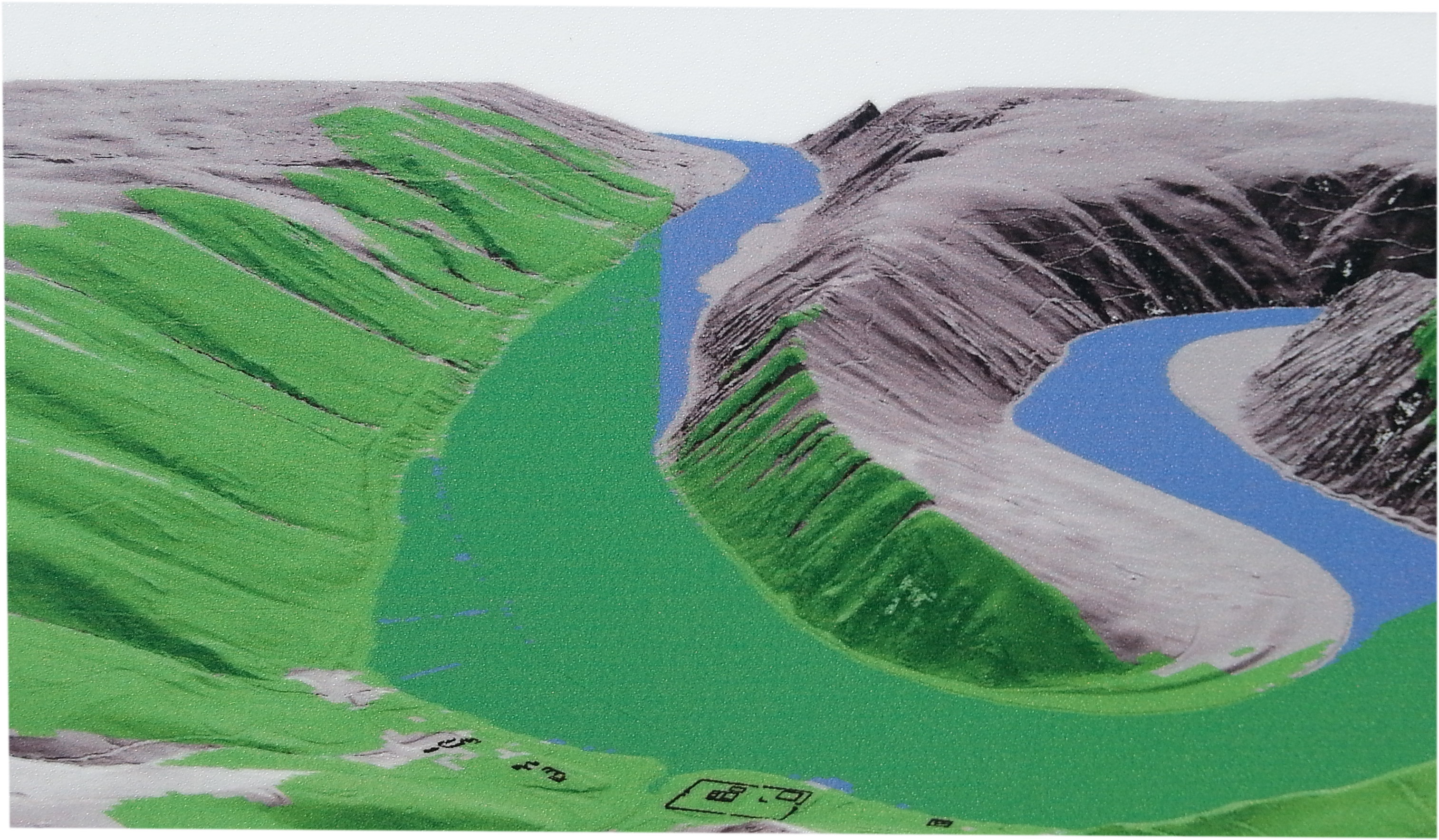 Überwachungsbereich (grün markiert) des Kastell Schlögen (Ioviacum).